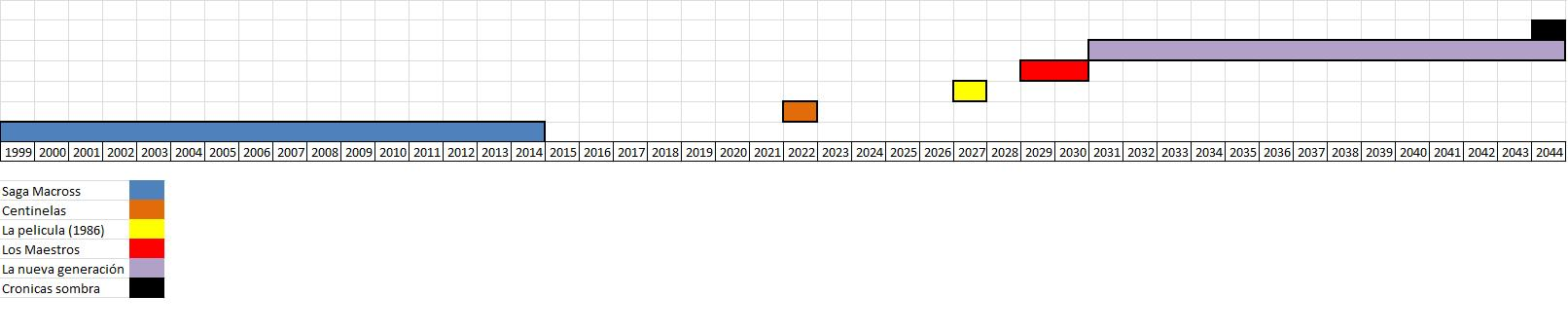 cronologia robotech